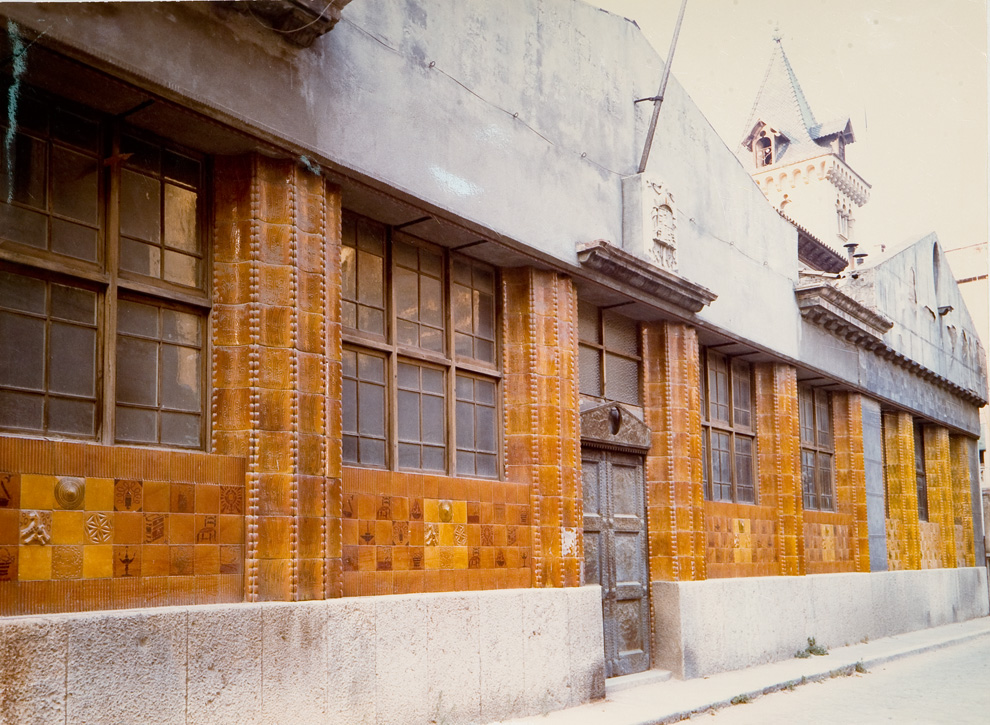 Escola arts i oficis